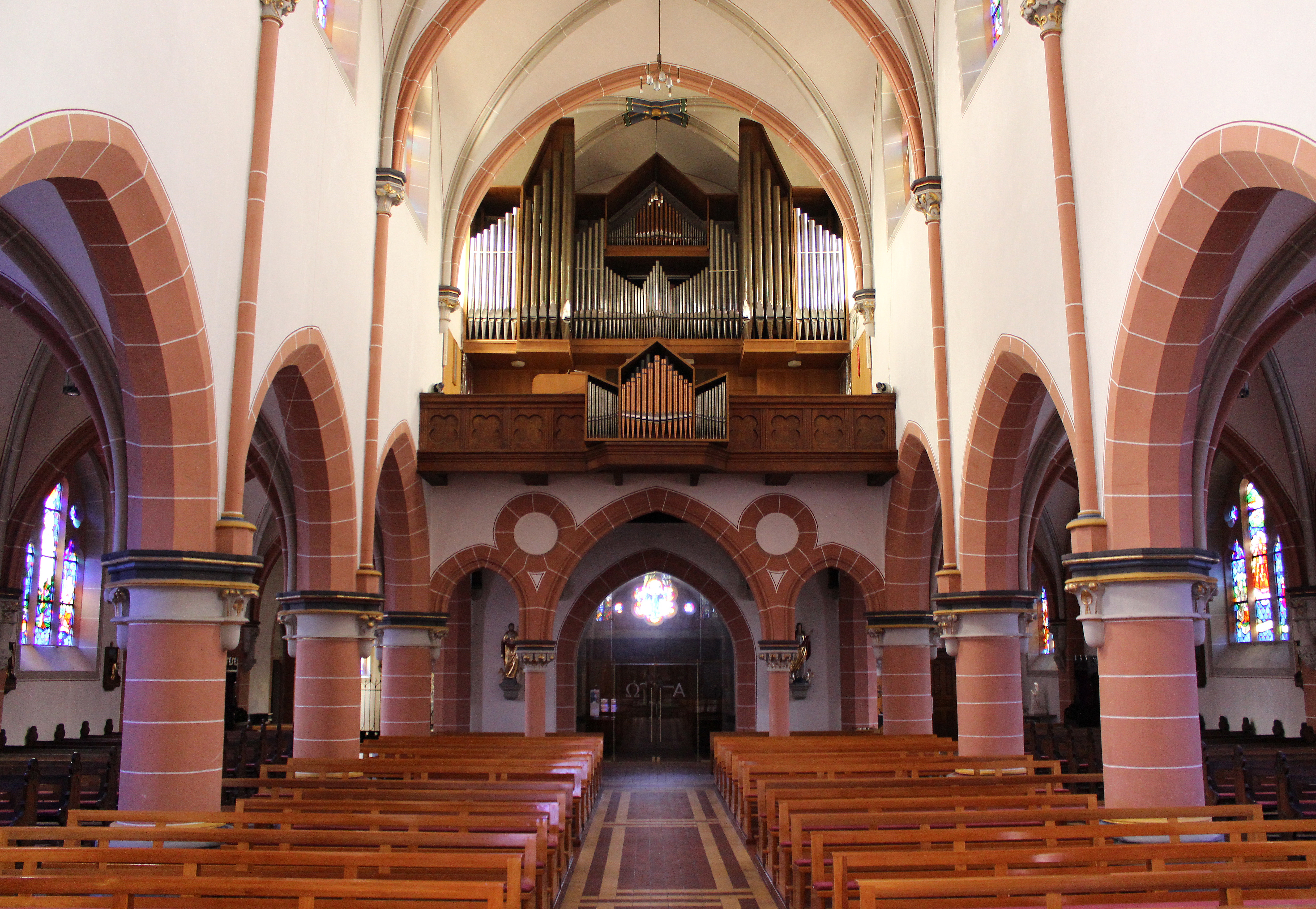 Blick ins Innere der katholischen Pfarrkirche St. Martin in Schwalbach, Landkreis Saarlouis, Saarland